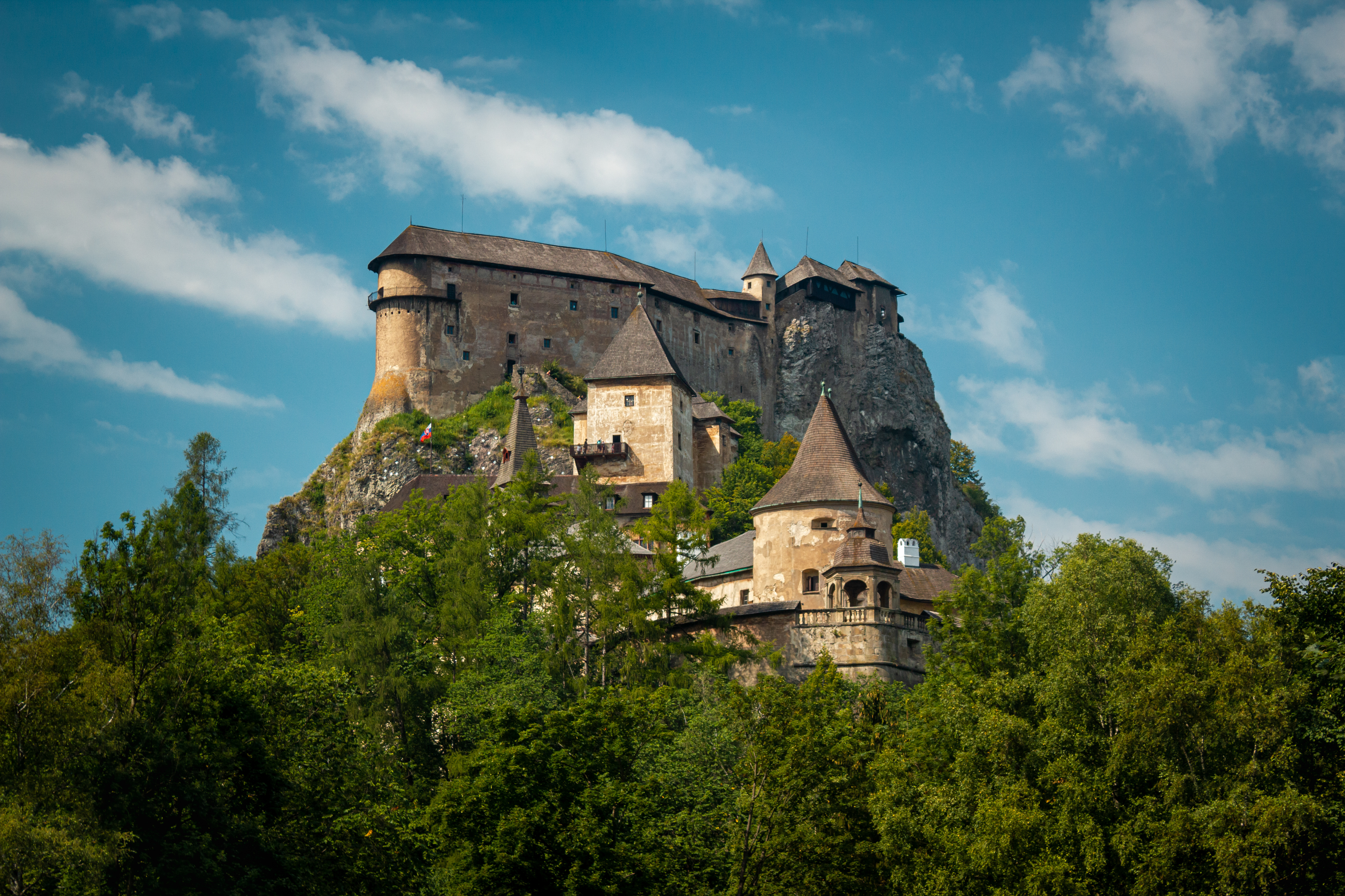 Oravský hrad